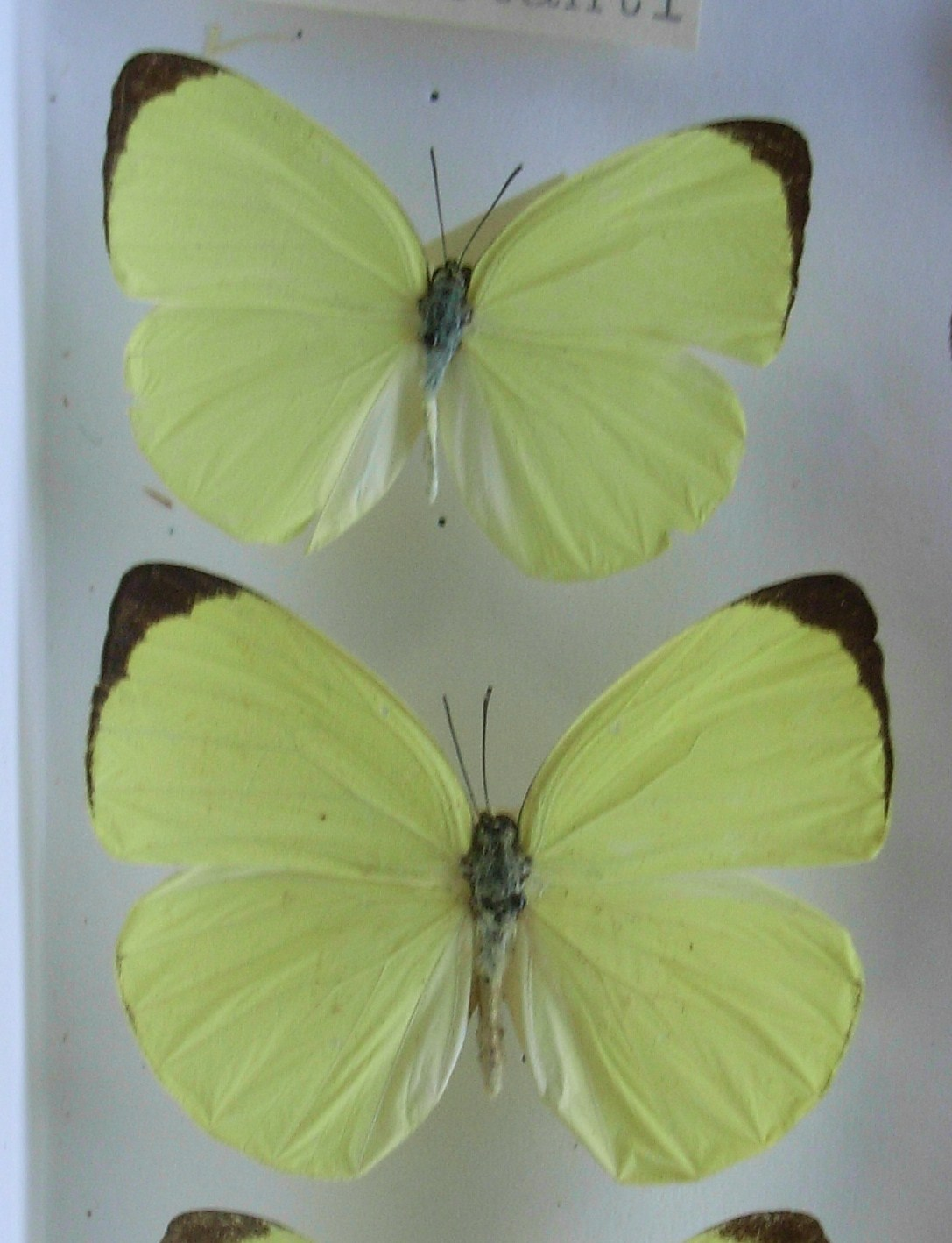 Gandaca harina distanti